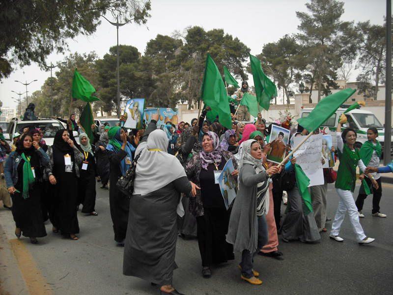 [Essam Mohamed] Escorted by security services, a group of Libyan women chant slogans in support of Moamer Kadhafi in Tripoli. وسط حضور قوات الأمن، تردد مجموعة من الليبيات شعارات تساند معمر القذافي في طرابلس Escorté par les services de sécurité, un groupe de femmes libyennes scande des slogans favorables à Mouammar Kadhafi à Tripoli. Full story: القصة L'article